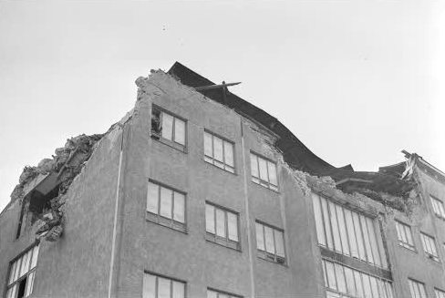 Koulu korjattiin, mutta pomituksen jälki näkyy siinä, että korjattu osa on eri värinen